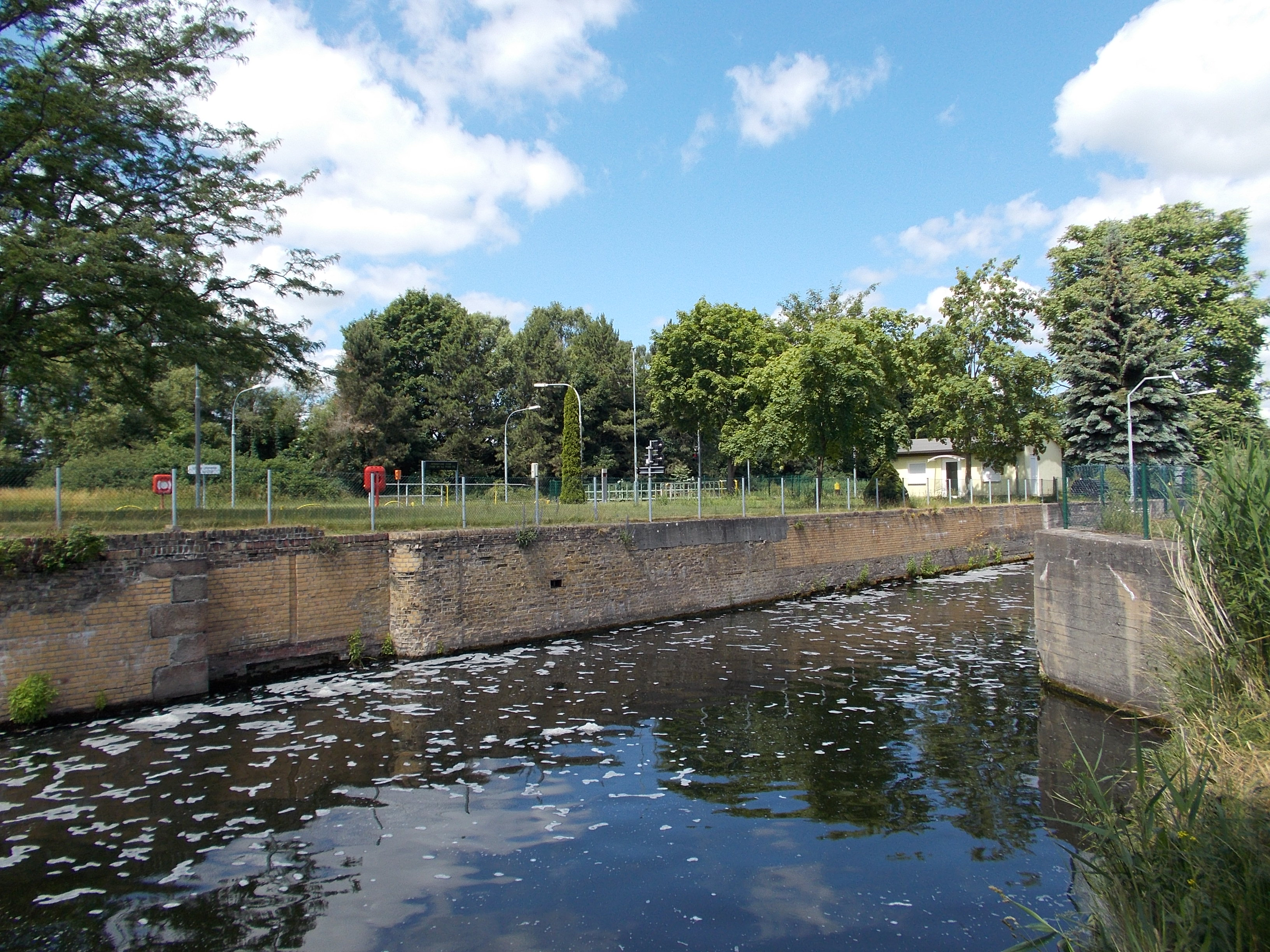 Alte Schleuse in Liebenwalde, Malzer Kanal (1834)